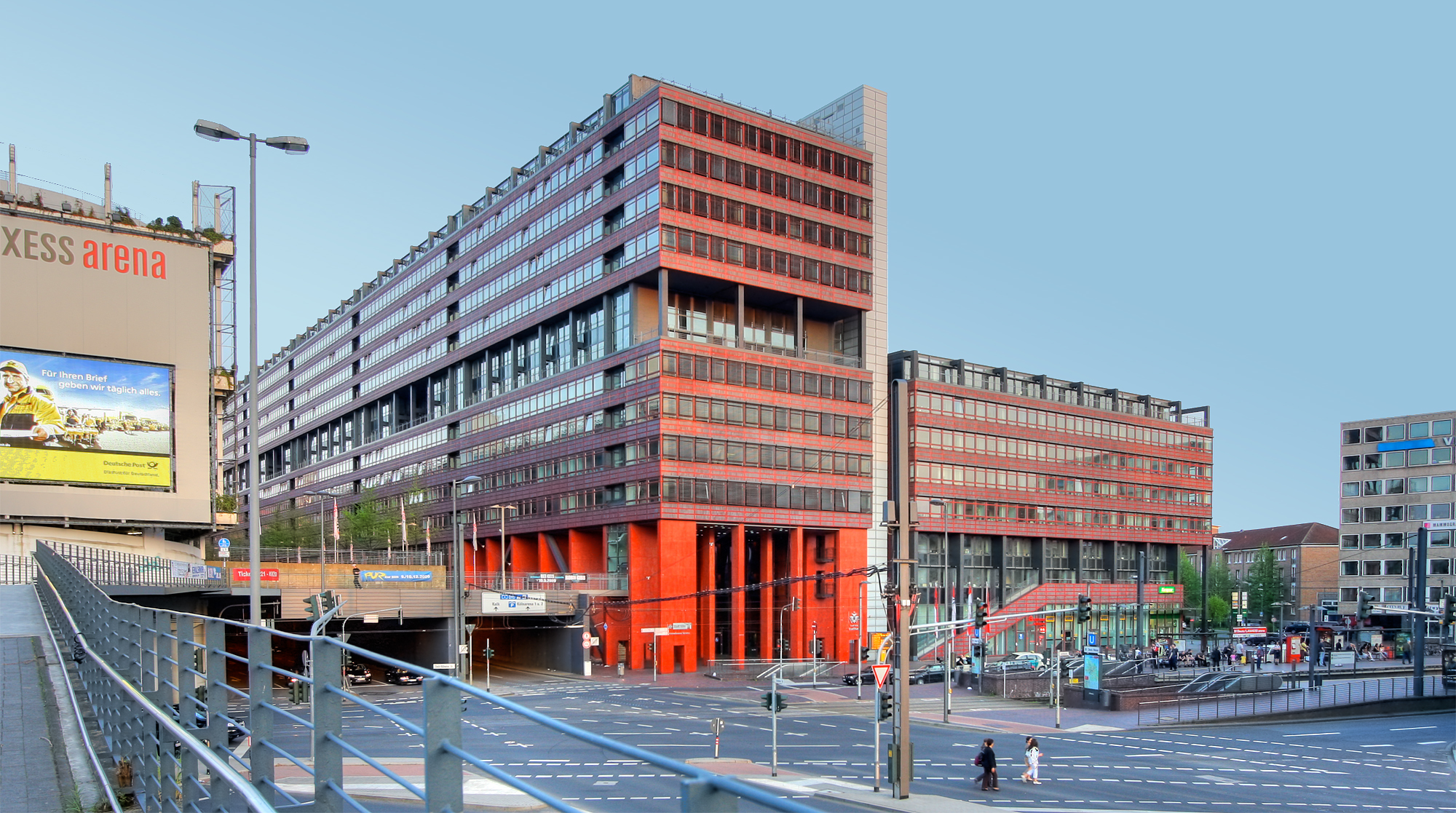 Technisches Rathaus in Köln-Deutz. Architekt: Gottfried Böhm